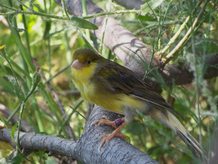 Canario doméstico (Serinus canaria domestica), variedad Timbrado Español; raza de canto valorado por sus vocalizaciones alegres y melodiosas, en las que predominan notas de timbres, campanas o floreos, en general, estos ejemplares emiten una sucesión de sonidos muy rica y variada.